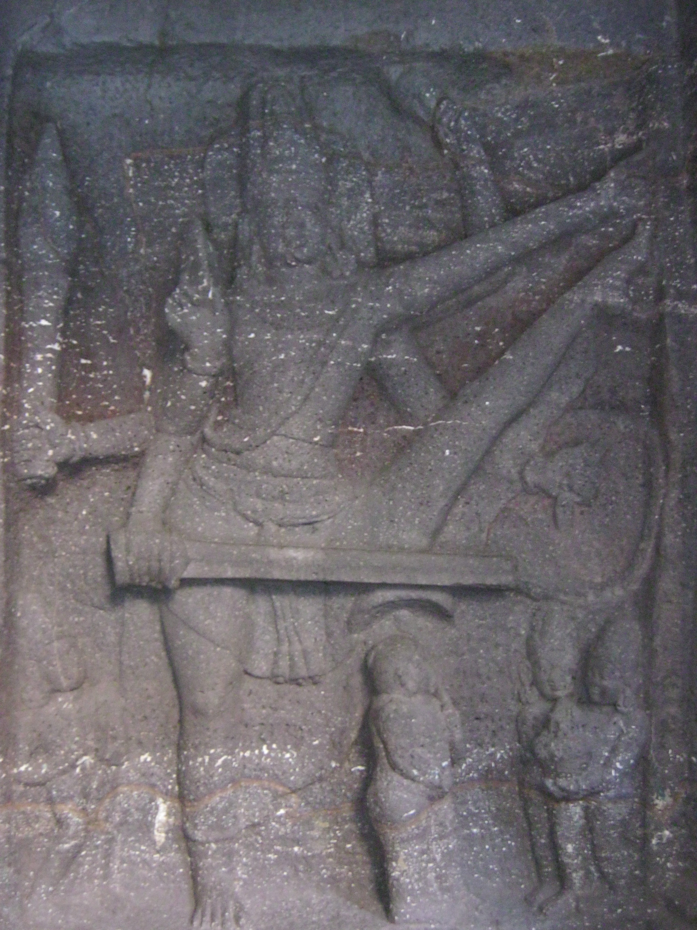 சிவபெருமான் நடனம், தூக்கிய திருவடி